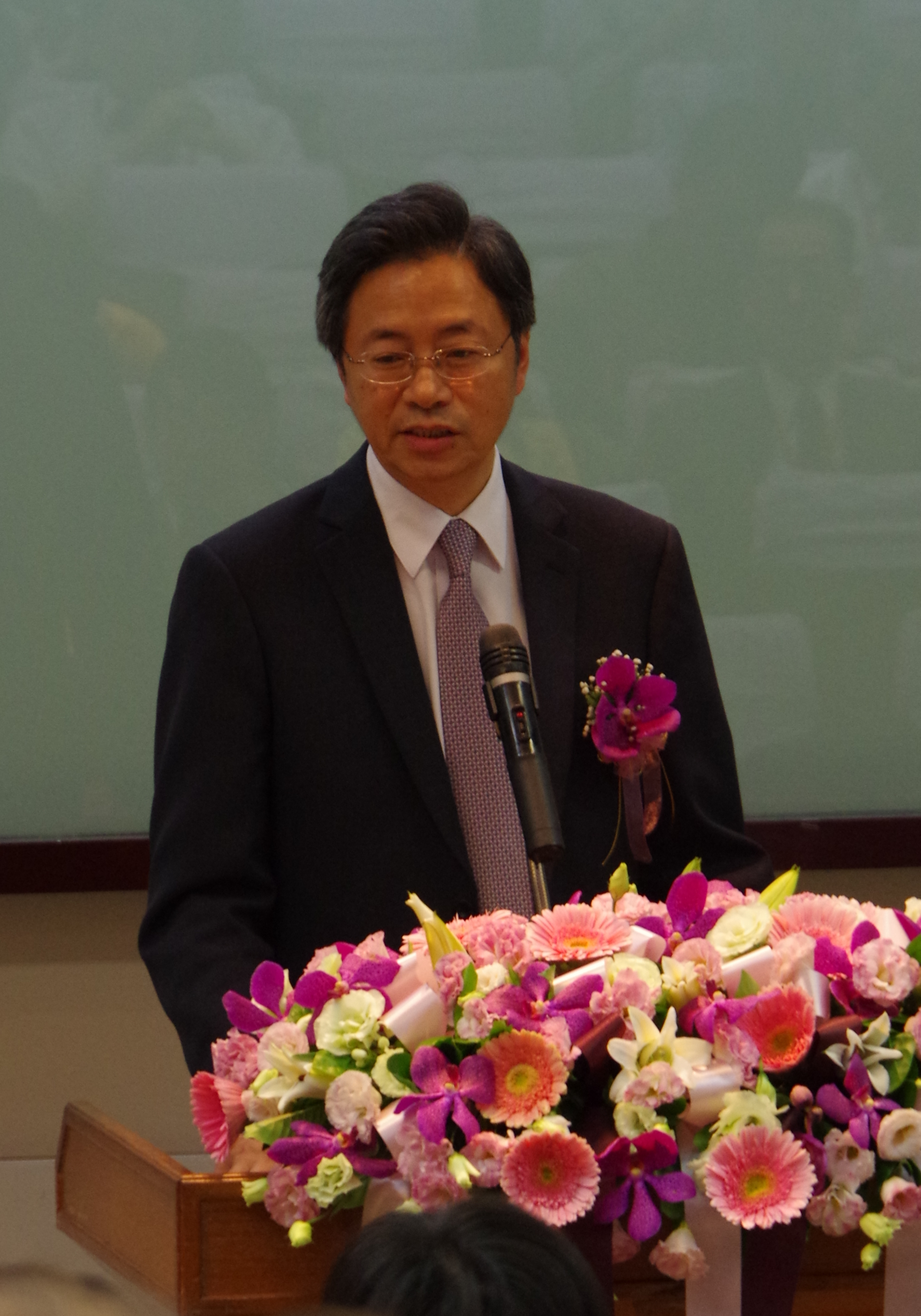 行政院副院長張善政。